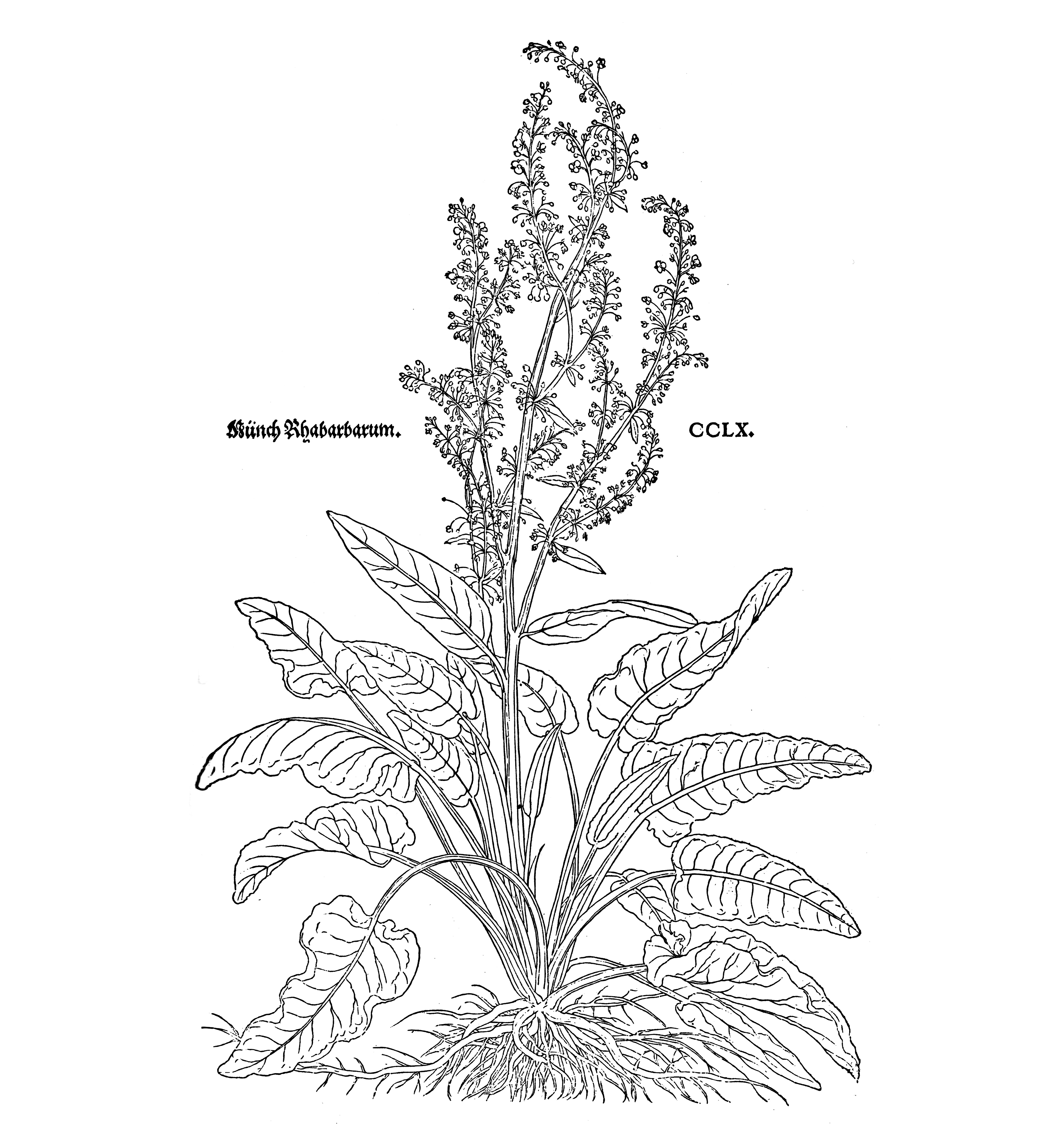 Abbildung des Alpenampfers